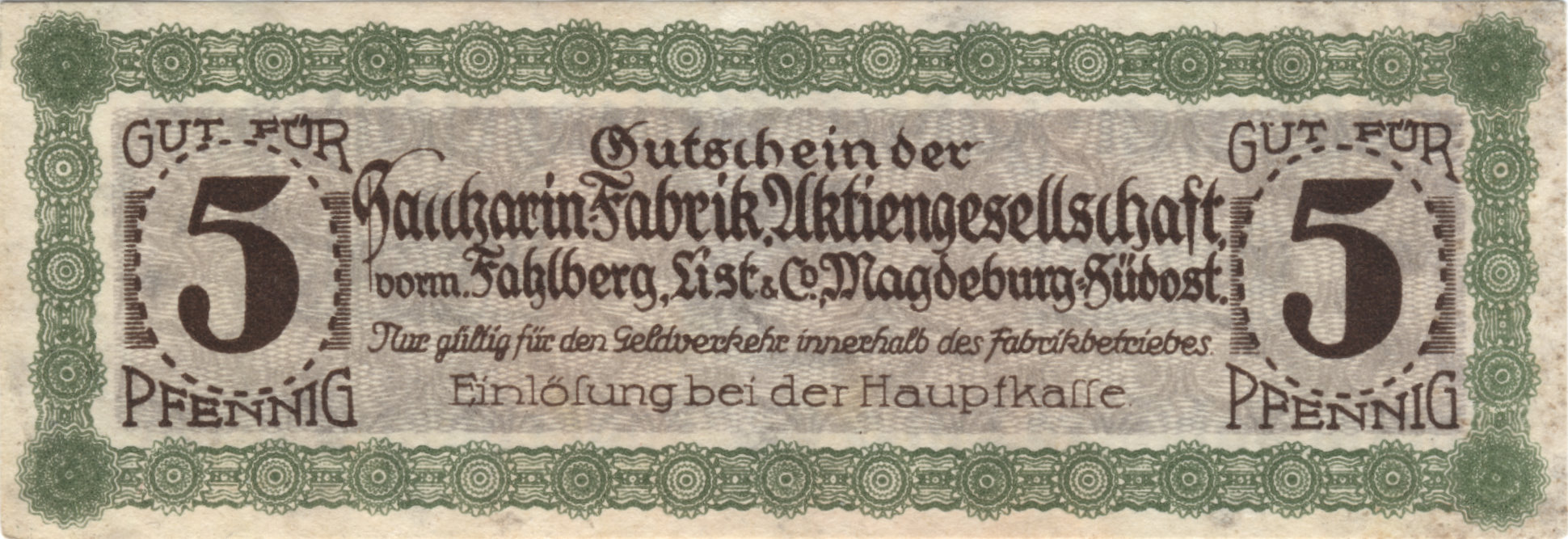 von der Saccharin-Fabrik AG Magdeburg-Südost in den 1920ern herausgegebenes Notgeld, 5 Pfennig-Gutschein